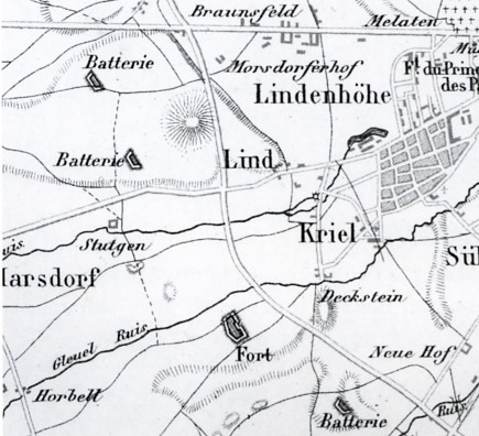 Kartenausschnitt des Köln-Limdenthaler Gebietes aus dem Jahr 1885